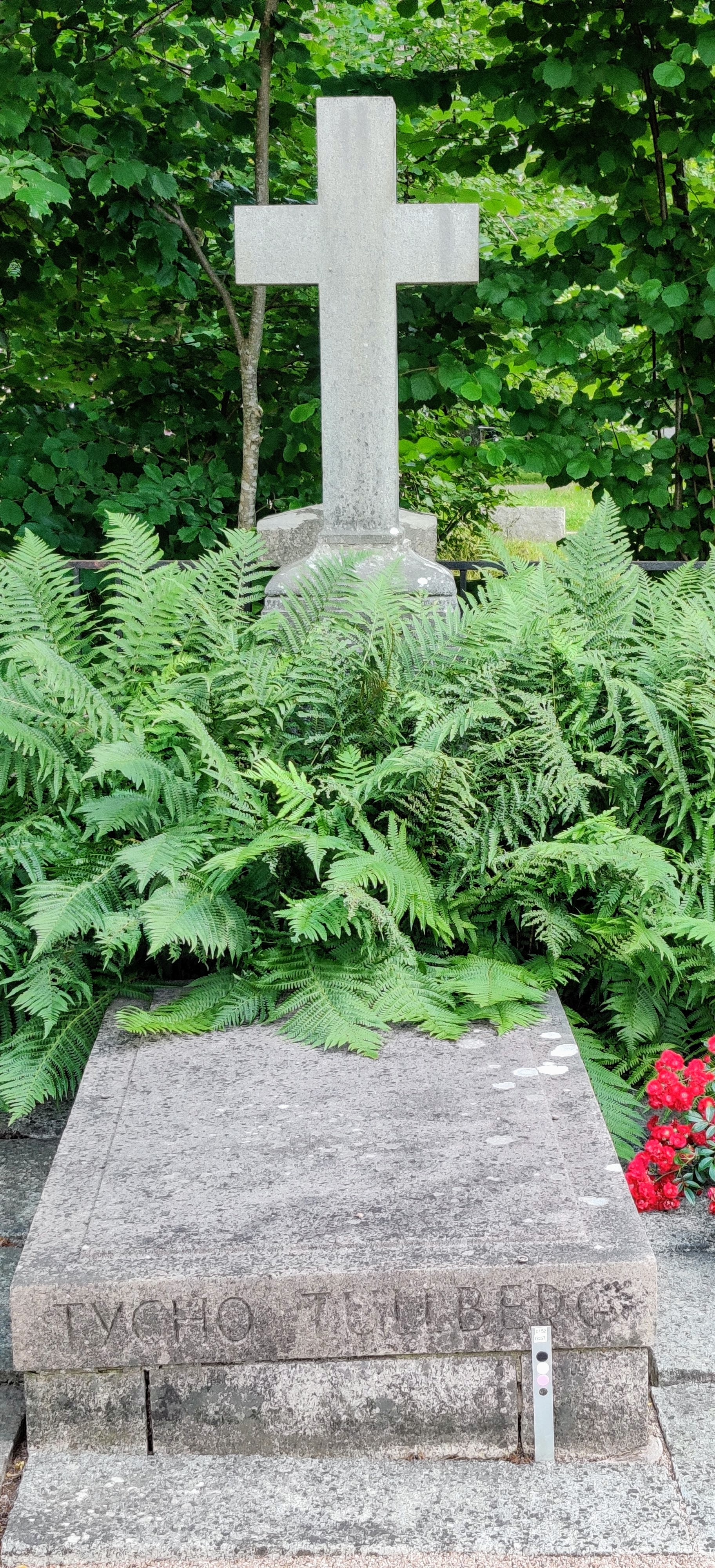 Gravvård Tycho Tullberg, Uppsala gamla kyrkogård Kvarter: 52 Gravplats: 0057